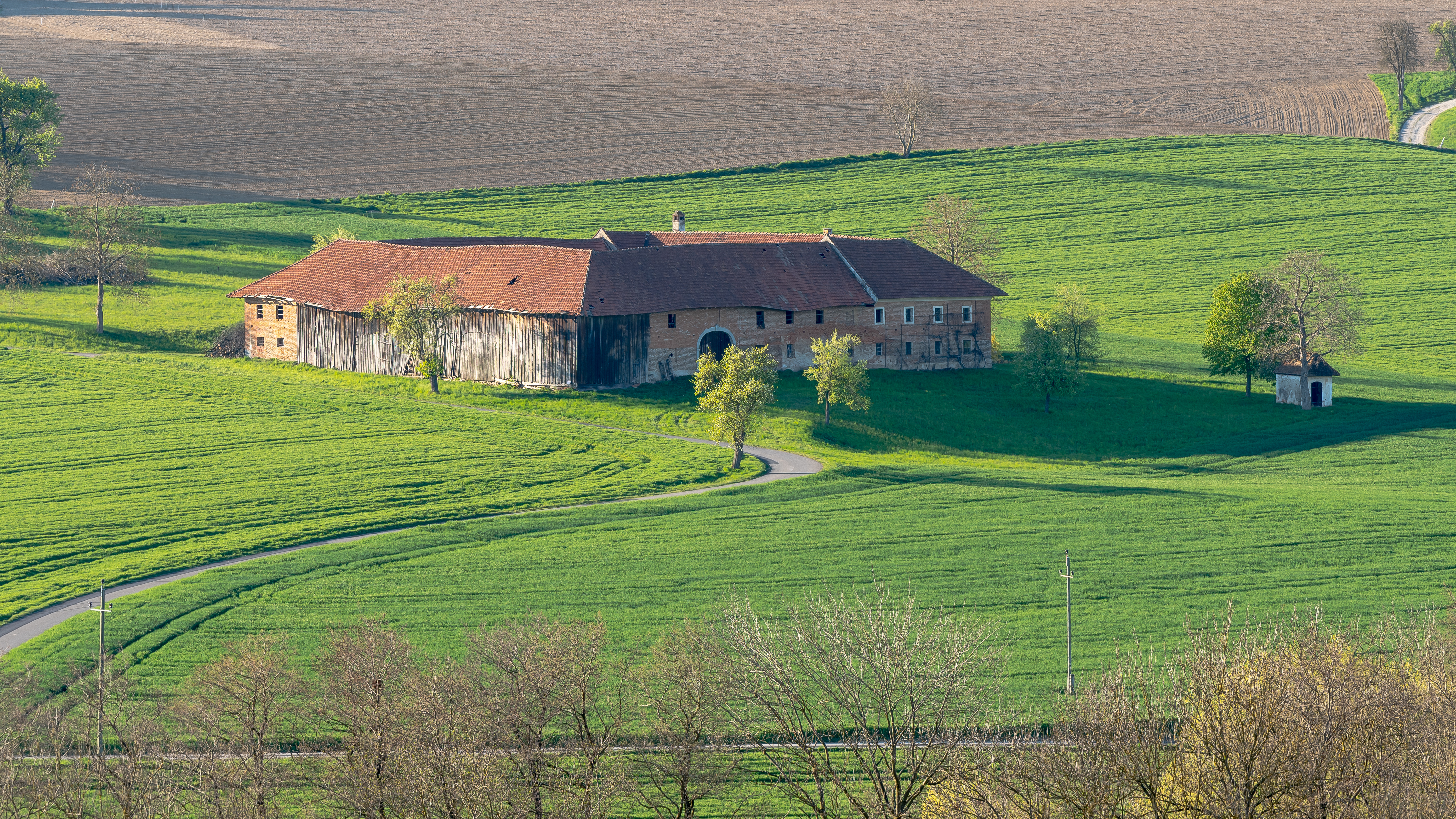 Der Bauernhof Sankt Leonhard 9 (Pucking / Oberösterreich) und die dazu gehörende Kapelle sind dem Verfall preisgegeben.